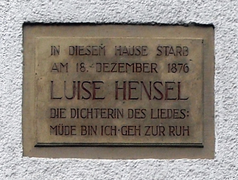 Gedenktafel für Luise Hensel am Westphalenhof in Paderborn Inschrift: IN DIESEM HAUSE STARB AM 18. DEZEMBER 1876 LUISE HENSEL DIE DICHTERIN DES LIEDES: MÜDE BIN ICH GEH ZUR RUH